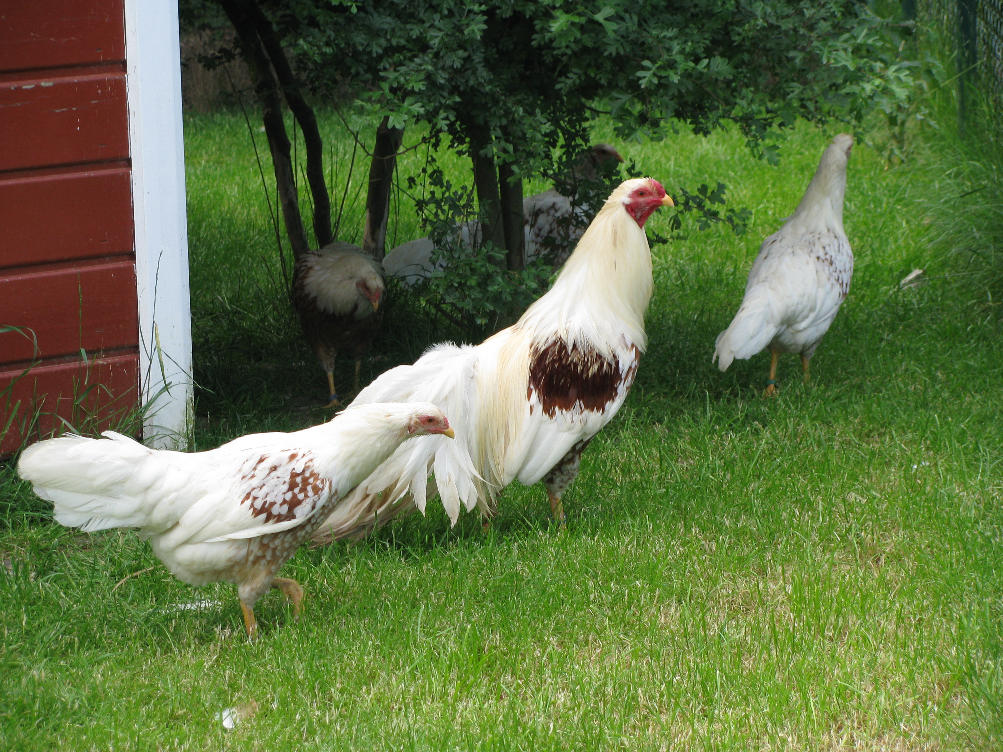 Yokhama-Hühner, aufgenommen im Wissenschaftlichen Geflügelhof Sinsteden